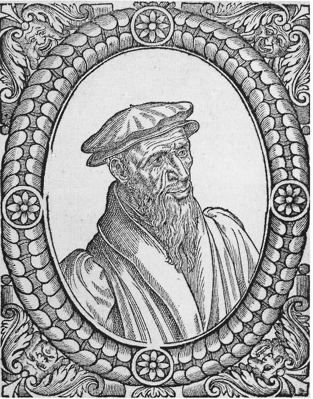 Guillaume Farel, original portrait in Theodore Beza's Icones